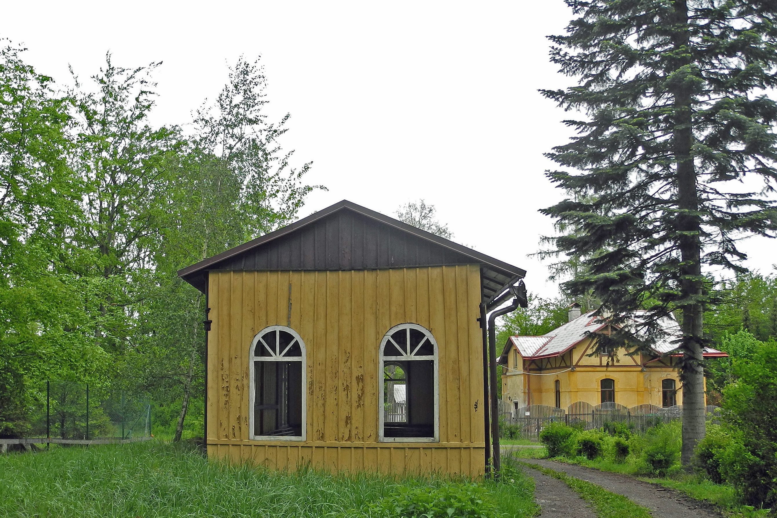 Fibich-Pavillon am Forsthaus Diana im Stadtwald von Karlsbad (Karlovy Vary)